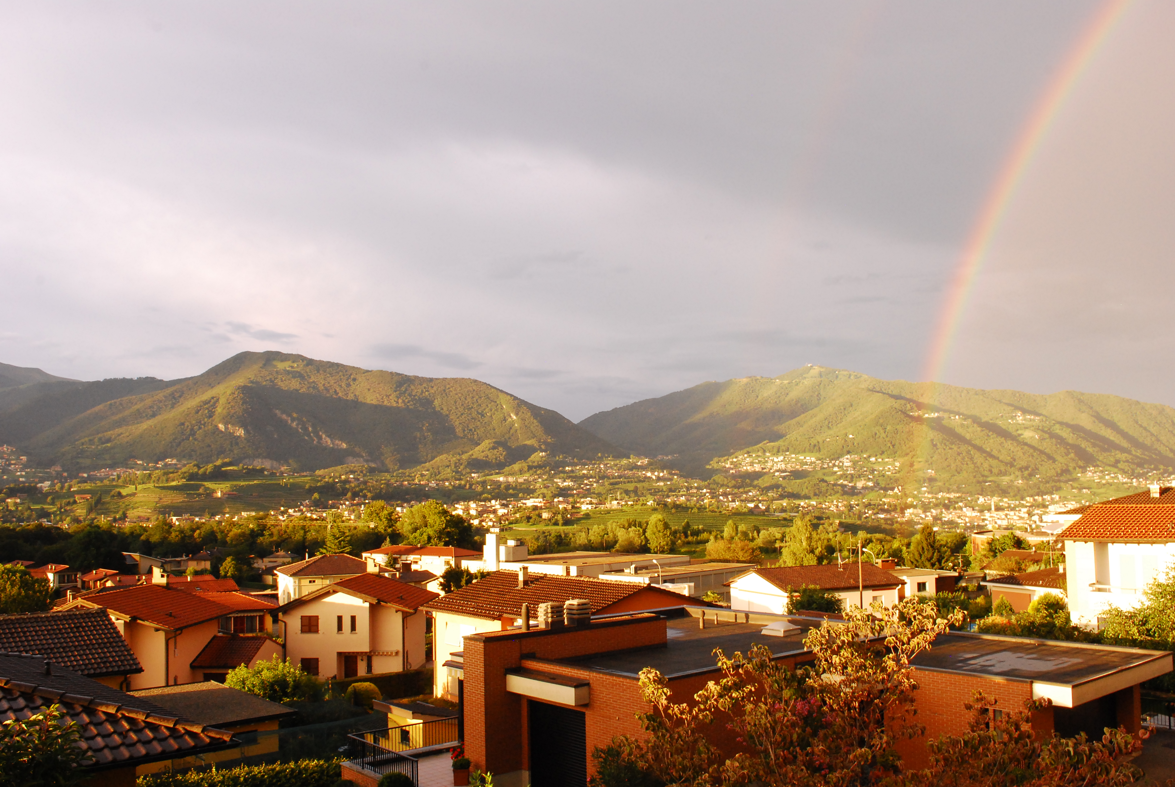 Arcobaleno Mendrisiotto